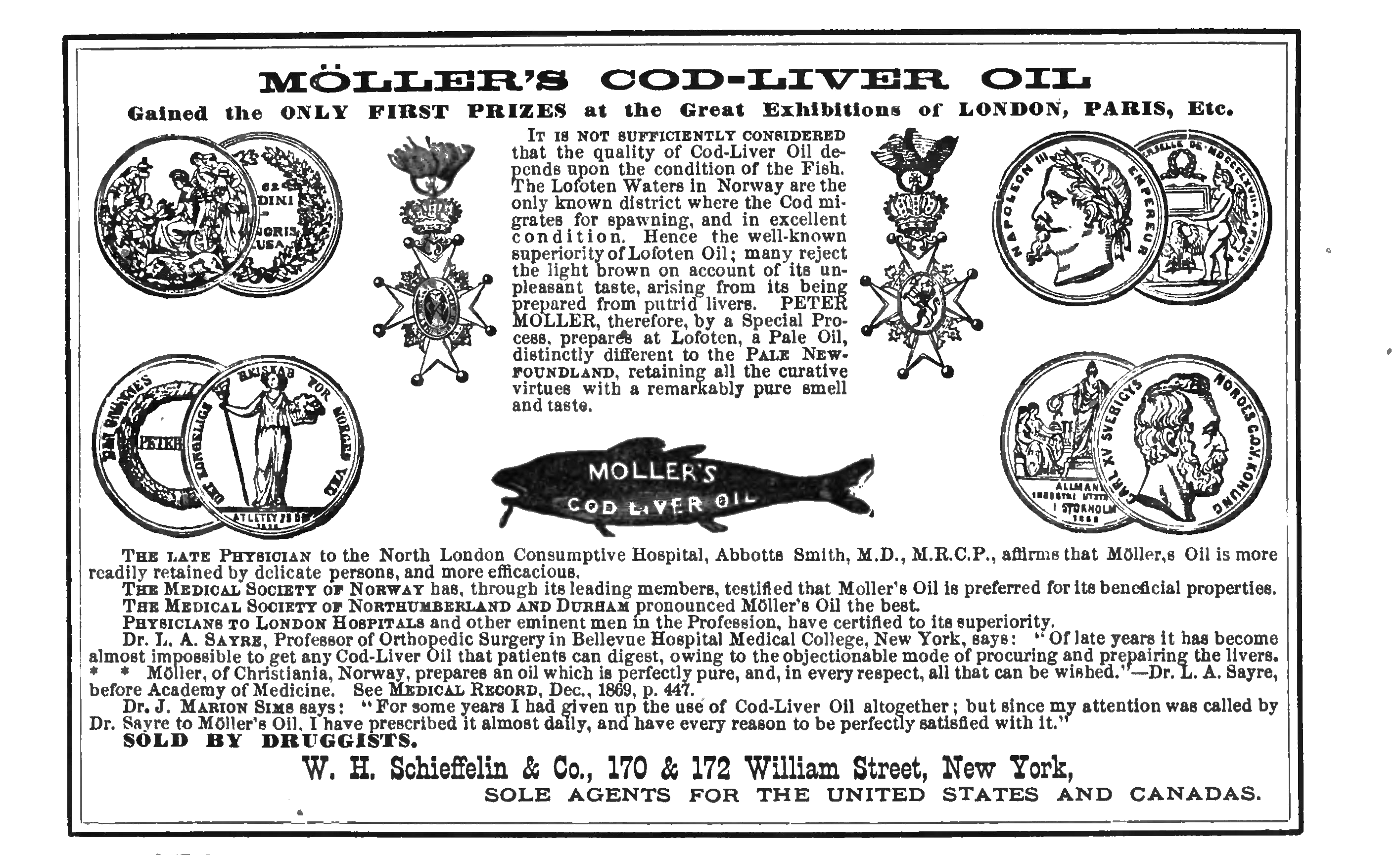 Moeller's cod-liver oil advertisement